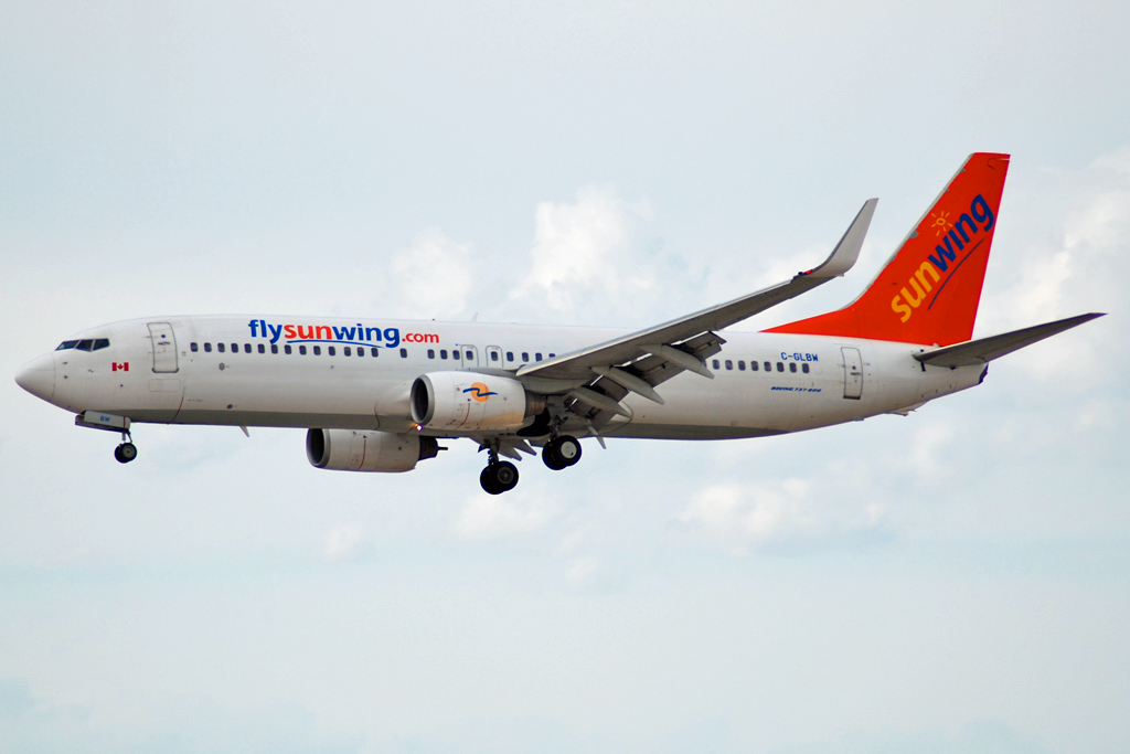 C-GLBW